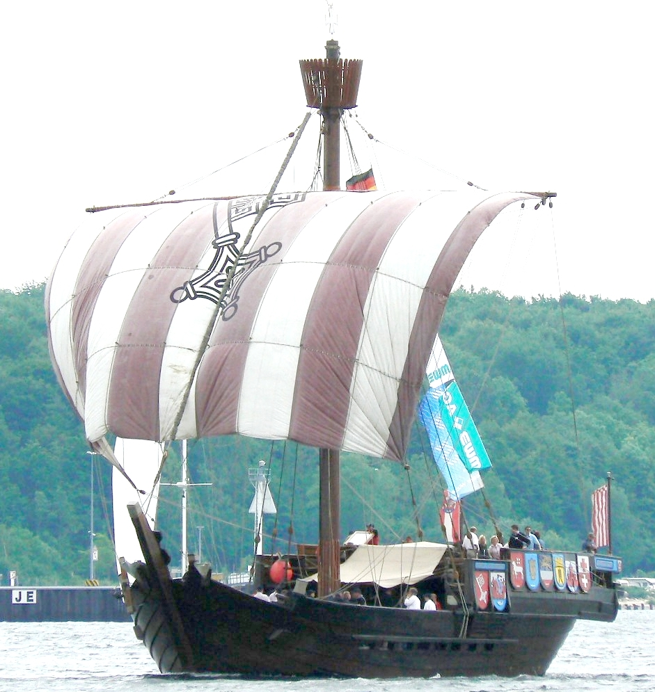 Segelschiff (Kogge) Ubena von Bremen auf der Kieler Woche 2007. Die Kogge ist ein Nachbau der 1962 gefundenen Bremer Hansekogge. Bauzeit: 1988-91. Rechts am Bildrand der Bug der Amphitrite.